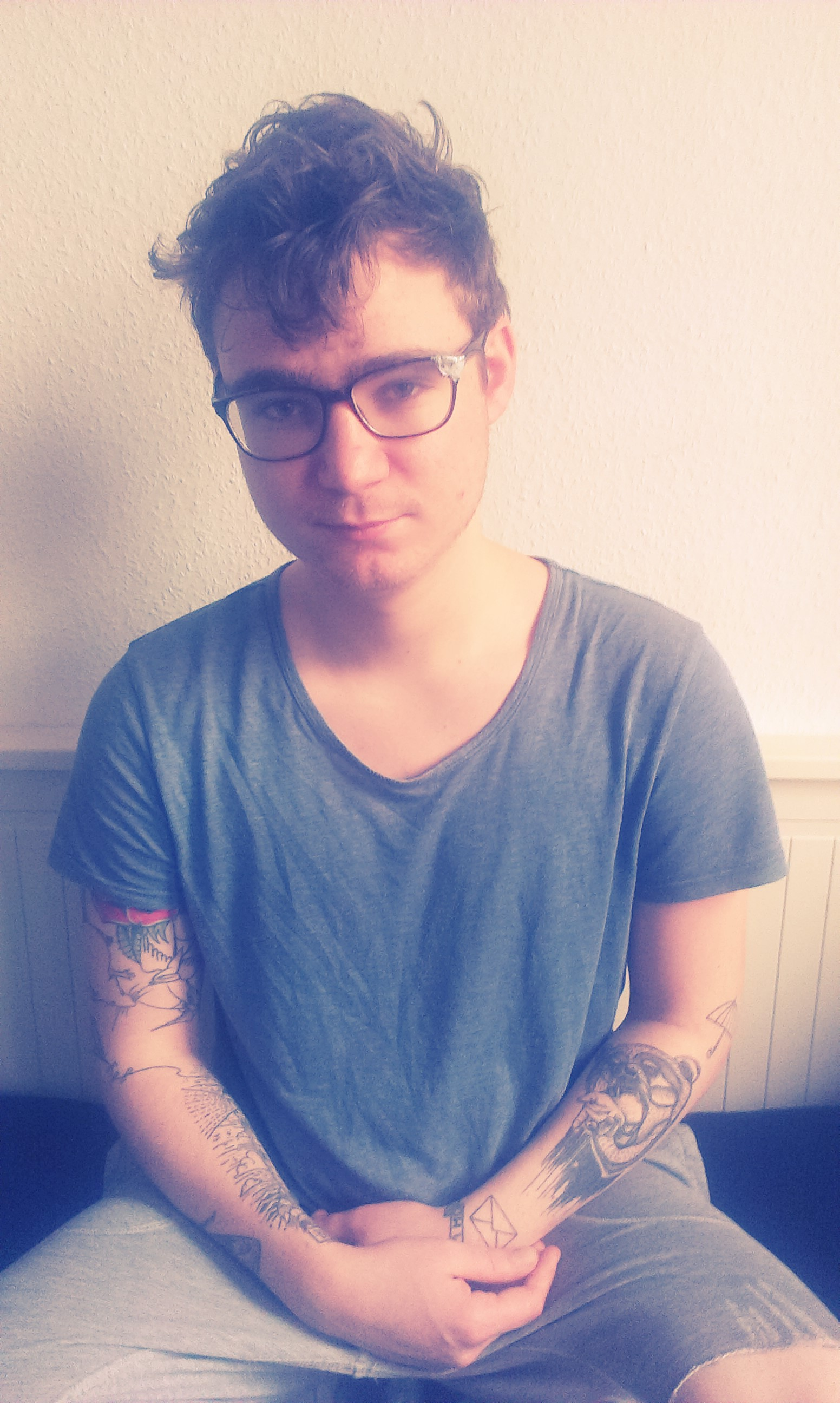 Ben Brooks.